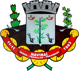 Brasão de Naviraí